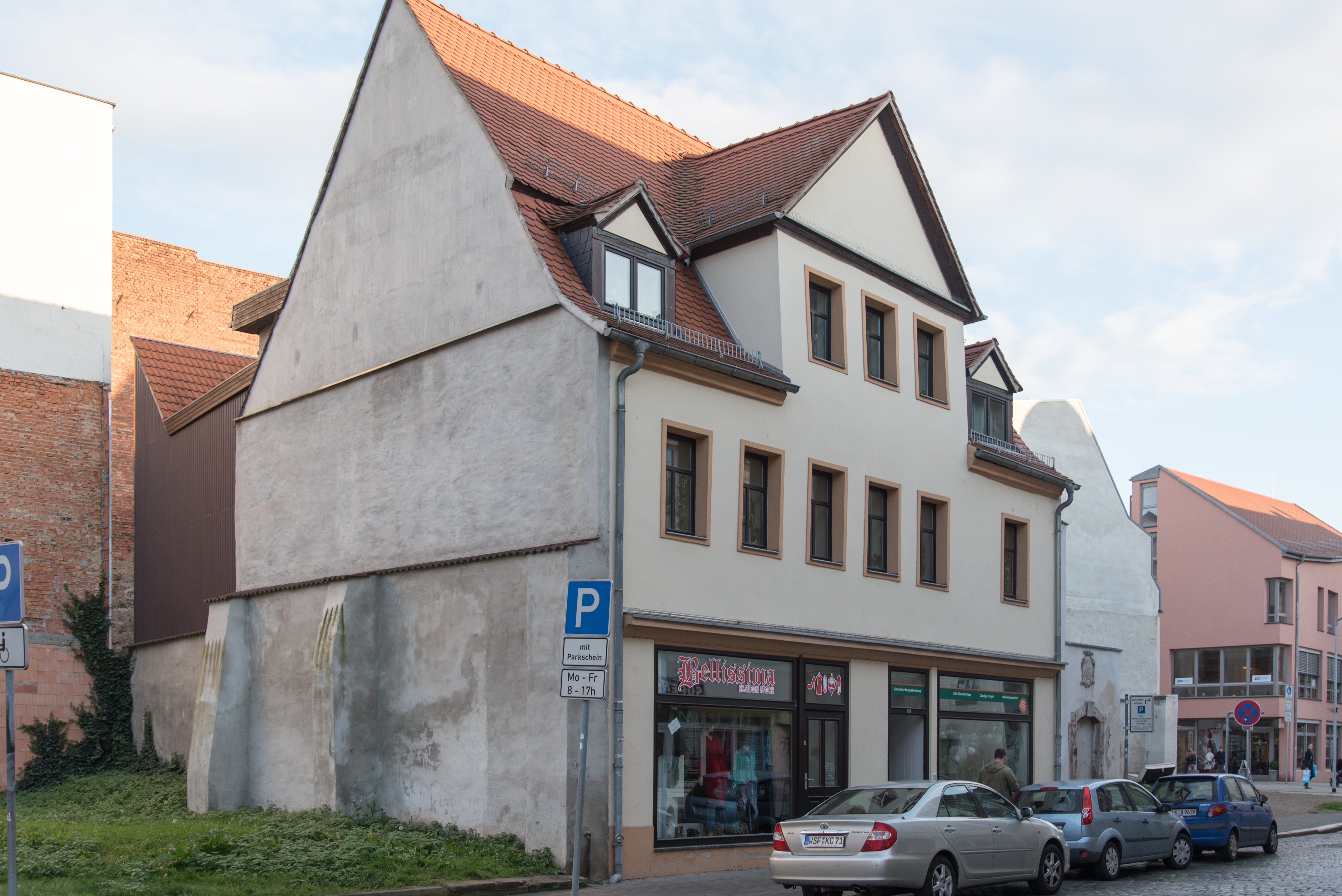 Weißenfels, Saalstraße 27